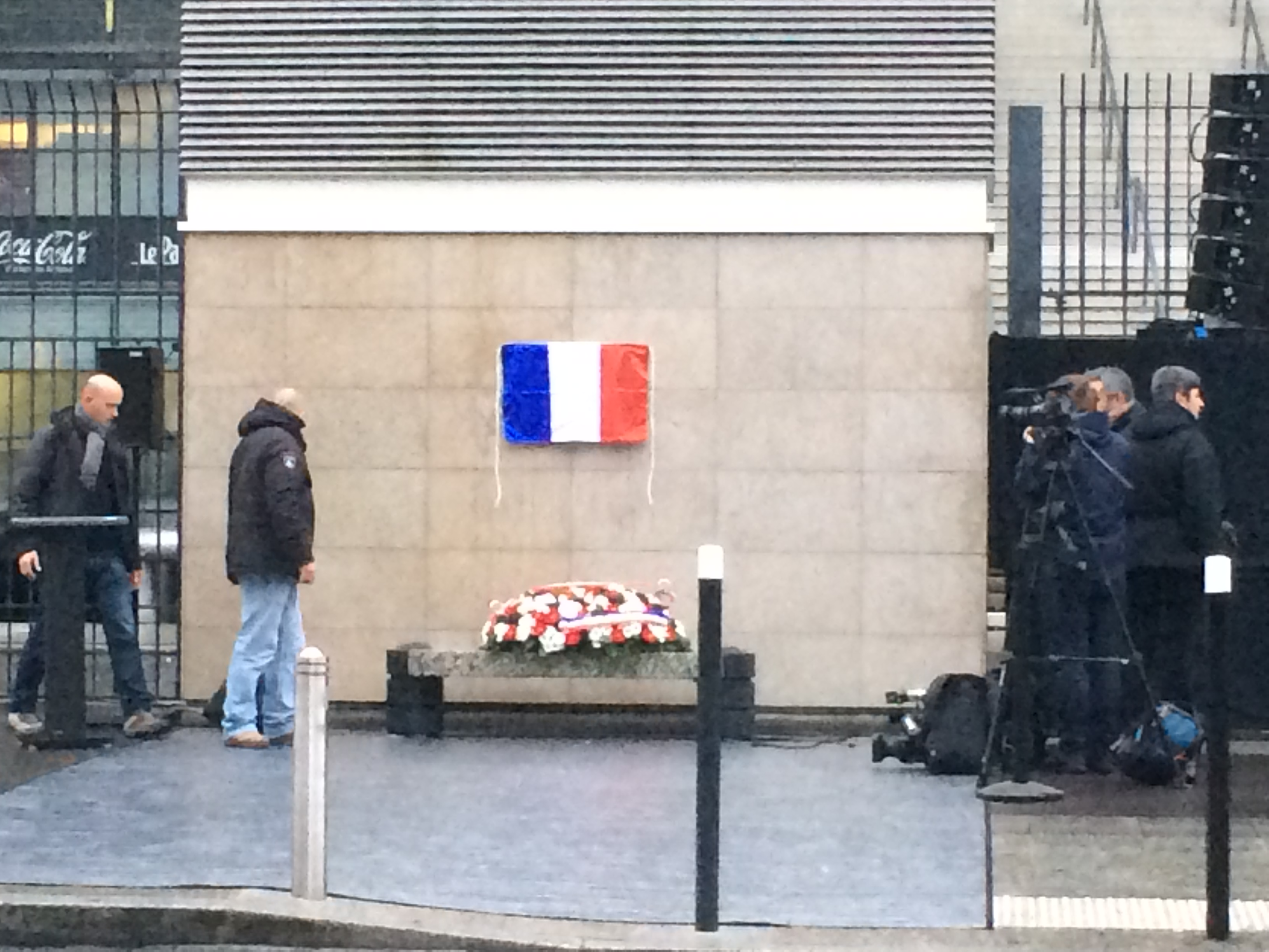 Avant la cérémonie d'hommage à Manuel Dias et aux victimes des attentats du 13 novembre 2015 aux abords du Stade de France porte D. Avant le dévoilement de la plaque (masquée par un drapeau français). La gerbe du Président de la République est déposée sur un socie en marbre : elle en sera descendue avant son dépôt officiel.